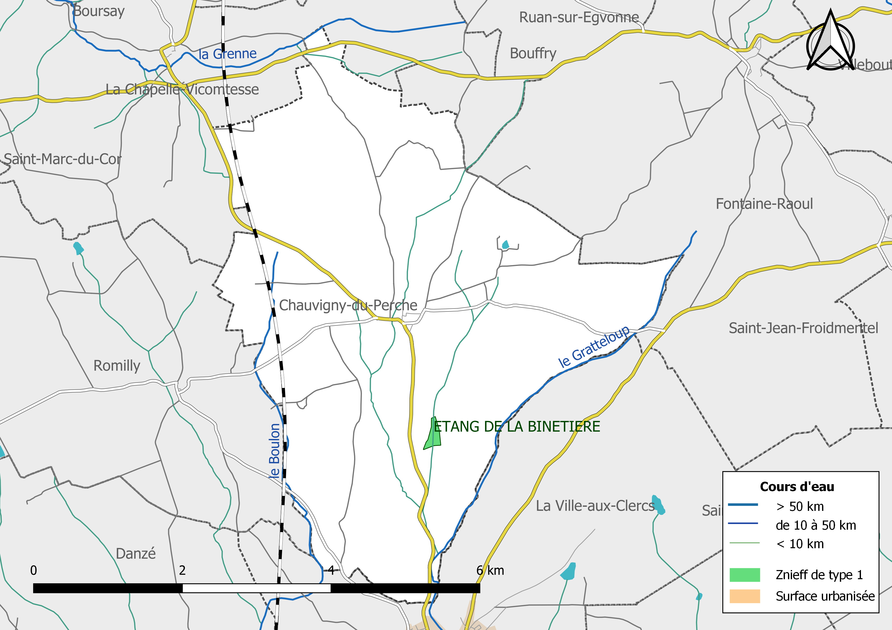 Carte des Zones naturelles d'intérêt écologique faunistique et Floristique (ZNIEFF) de type 1 de la commune de Chauvigny-du-Perche. (Loir-et-Cher, France).